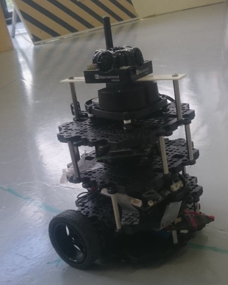 Turtlebot 3 Burger suivant une trajectoire